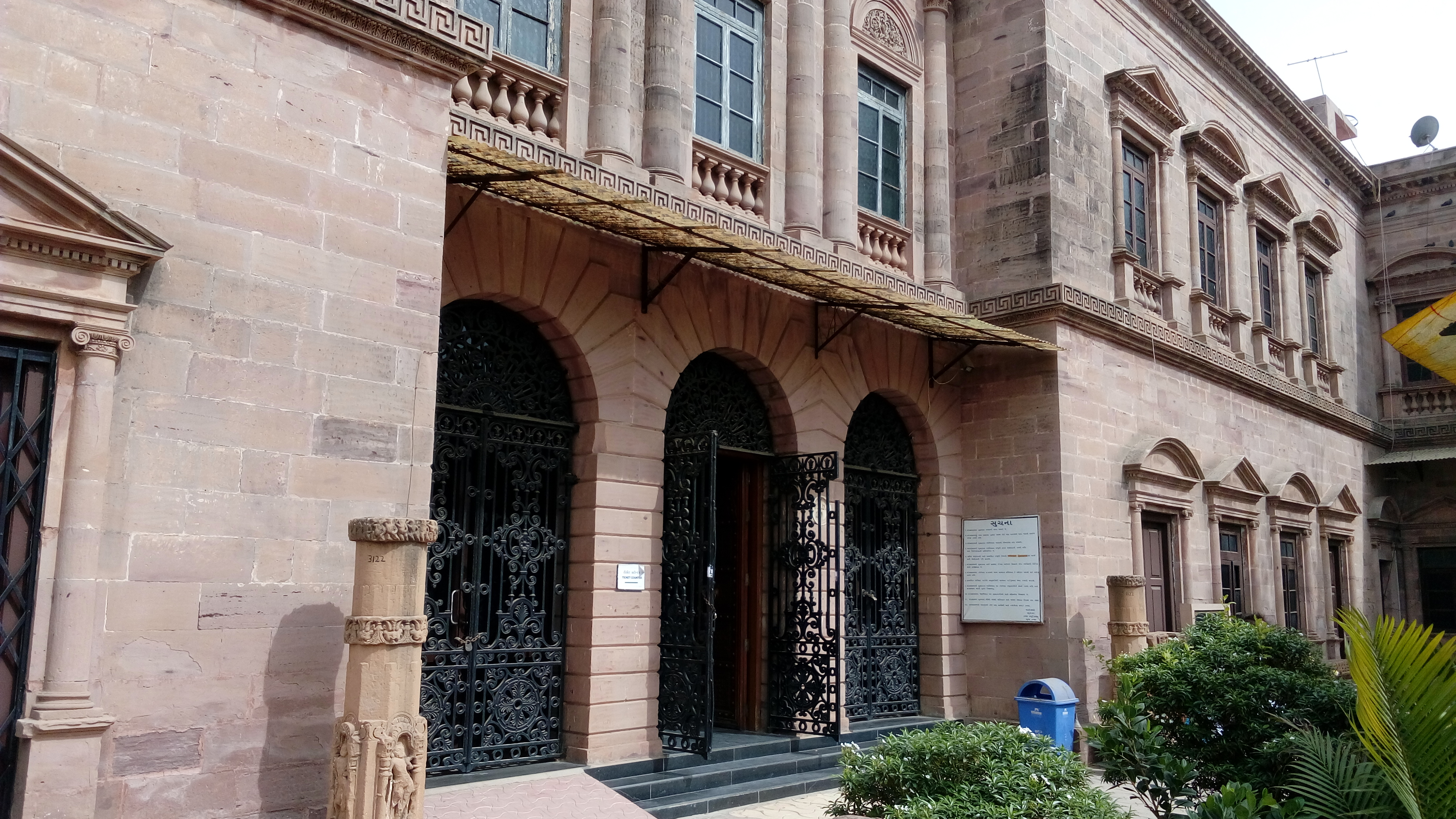 Kutch Museum in Bhuj, Kutch, Gujarat, India